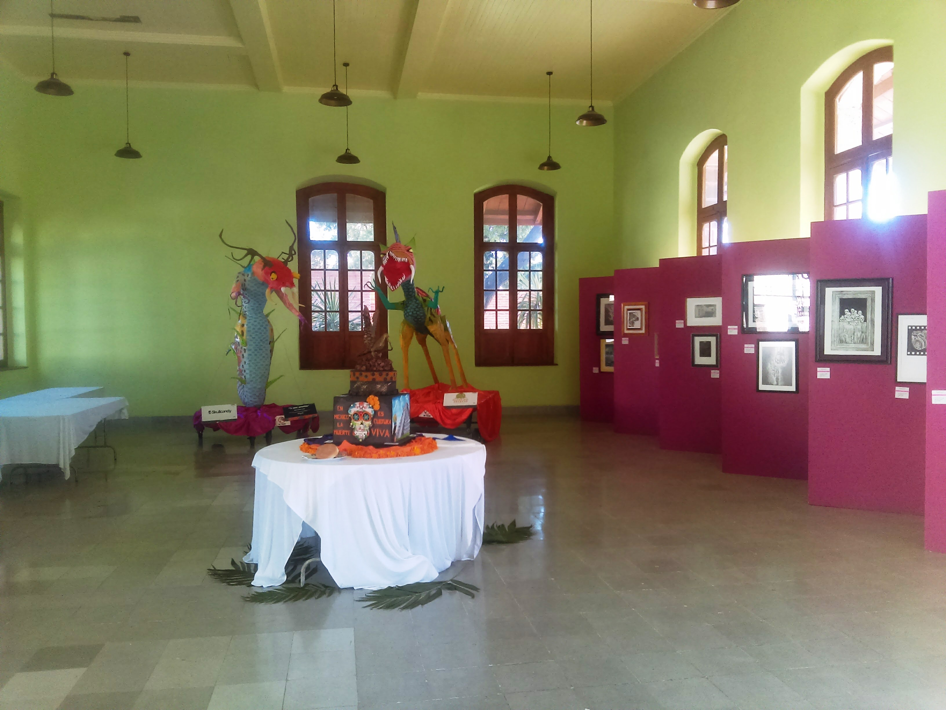 Centro Cultural del Ferrocarril en Pachuca, México